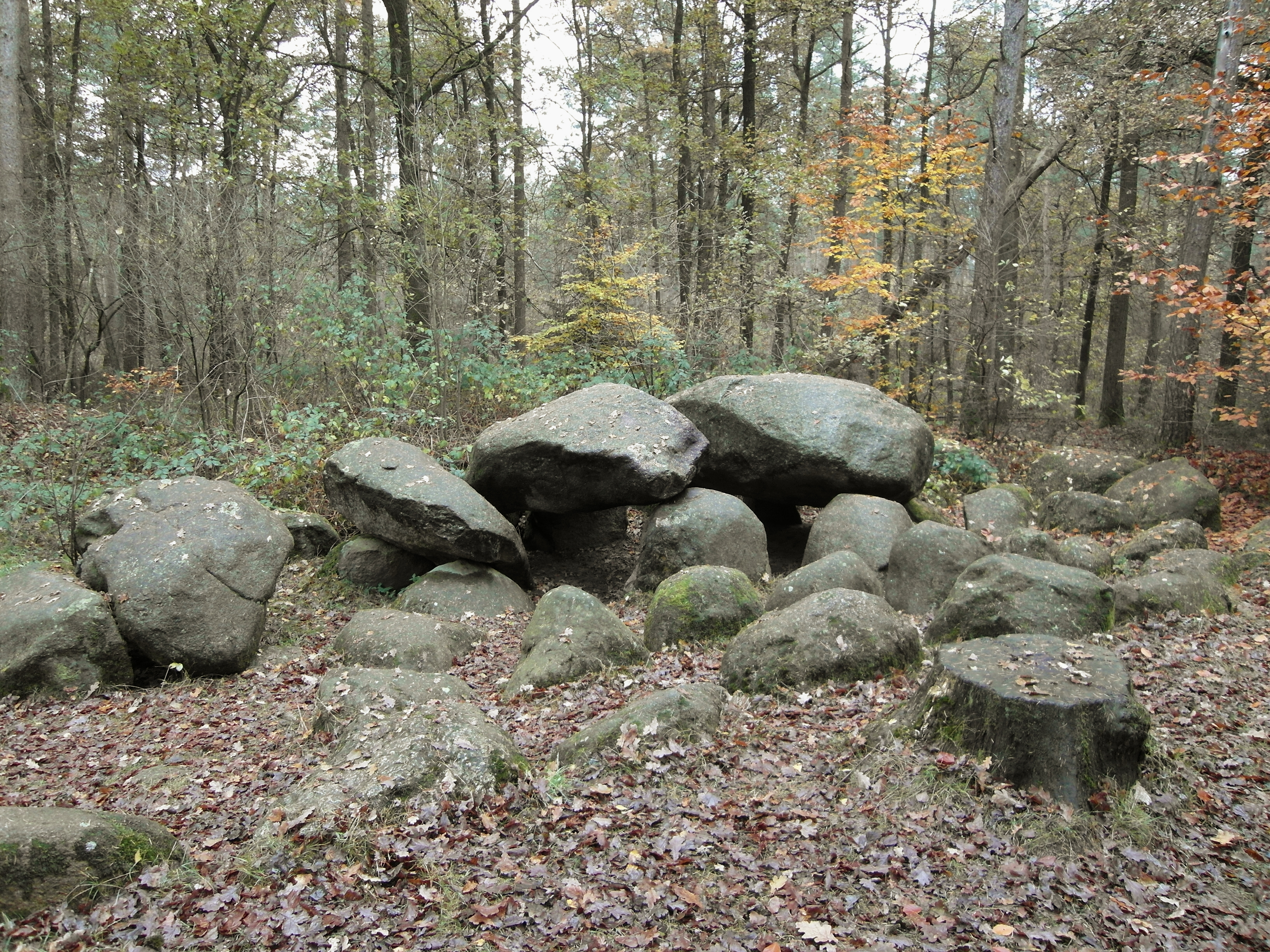 Großsteingrab in der Kunkenvenne (Landkreis Emsland, Niedersachsen).